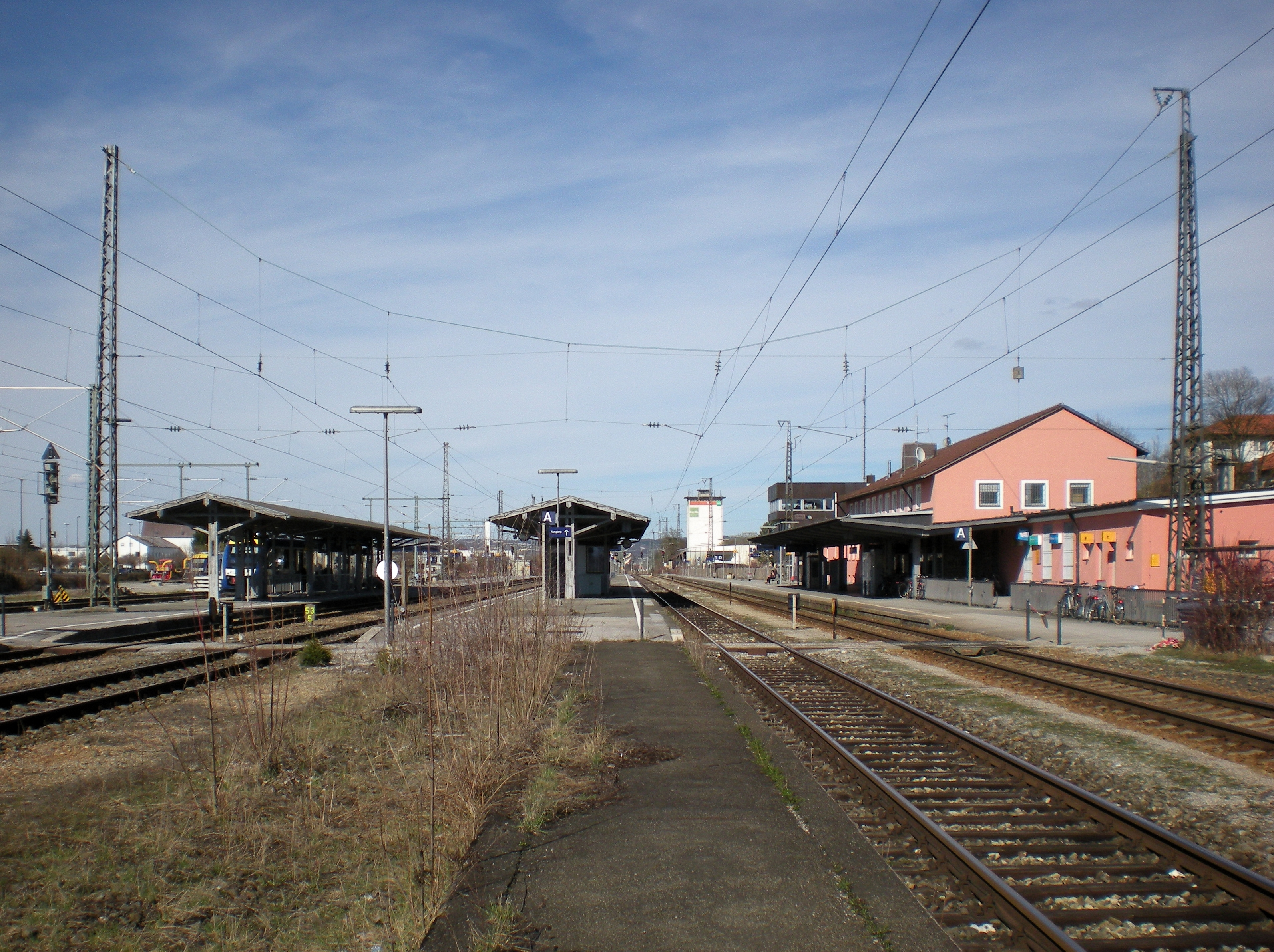 Bahnsteige und Gleisseite des Empfangsgebäudes am Bahnhof Weilheim mit LINT 41 der BRB